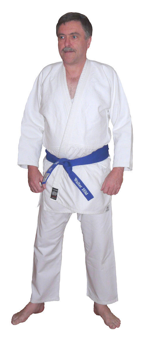 Der traditionelle Judo-Anzug besteht aus einer knöchellangen weißen Baumwollhose (Zubon) und darüber einer halblangen weißen Jacke (Uwagi) aus reißfester Baumwolle, die durch einen farbigen Gürtel (Obi) zusammengehalten wird (Judo-Gi)